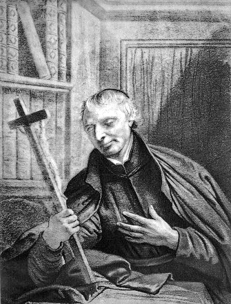 Portrait de Louis Bourdaloue (1632-1704) par Jean Jouvenet (1644-1717). Dessin.